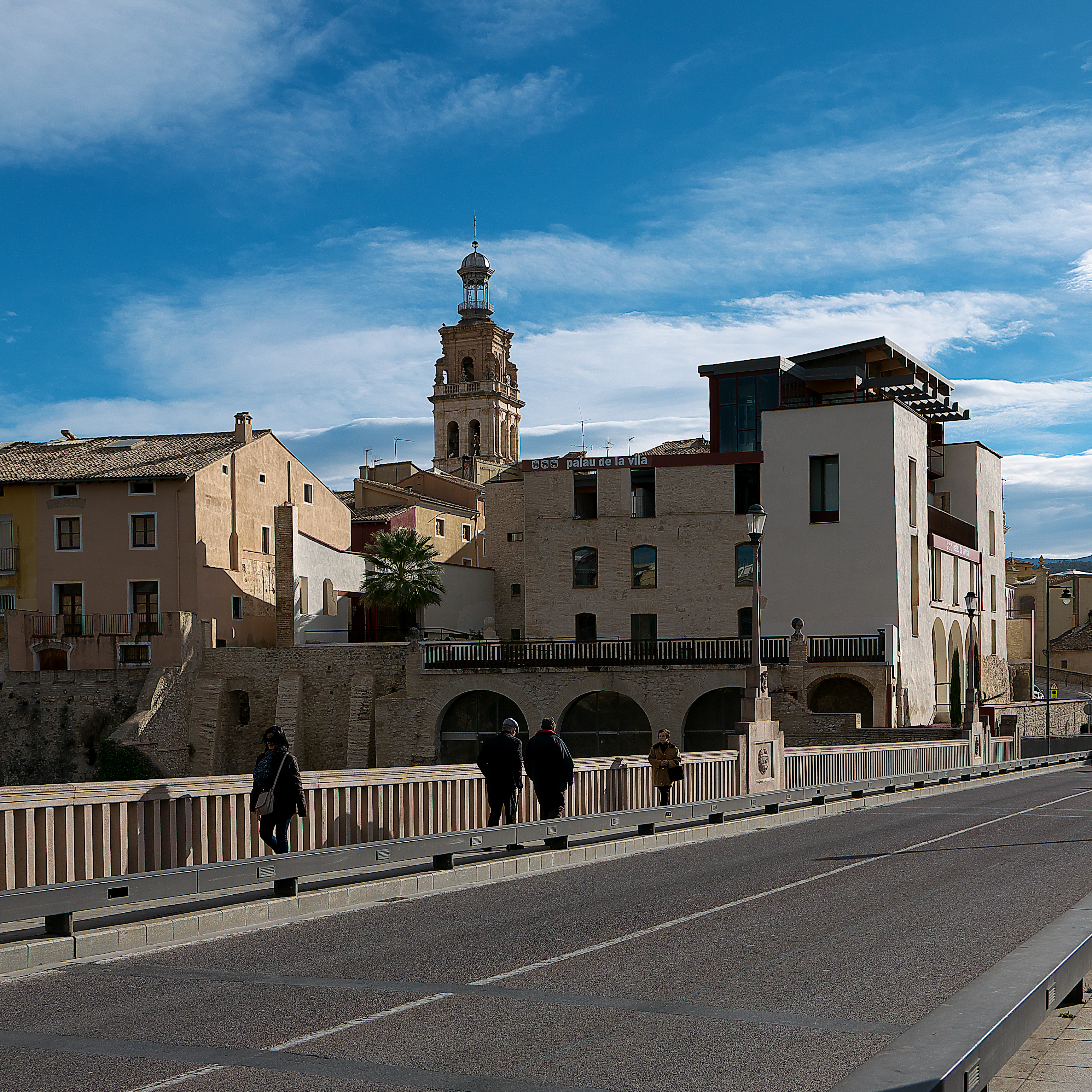 Casa en Onteniente de Josefa Dominga Catalá de Valeriola, Duquesa de Almodóvar del Río.